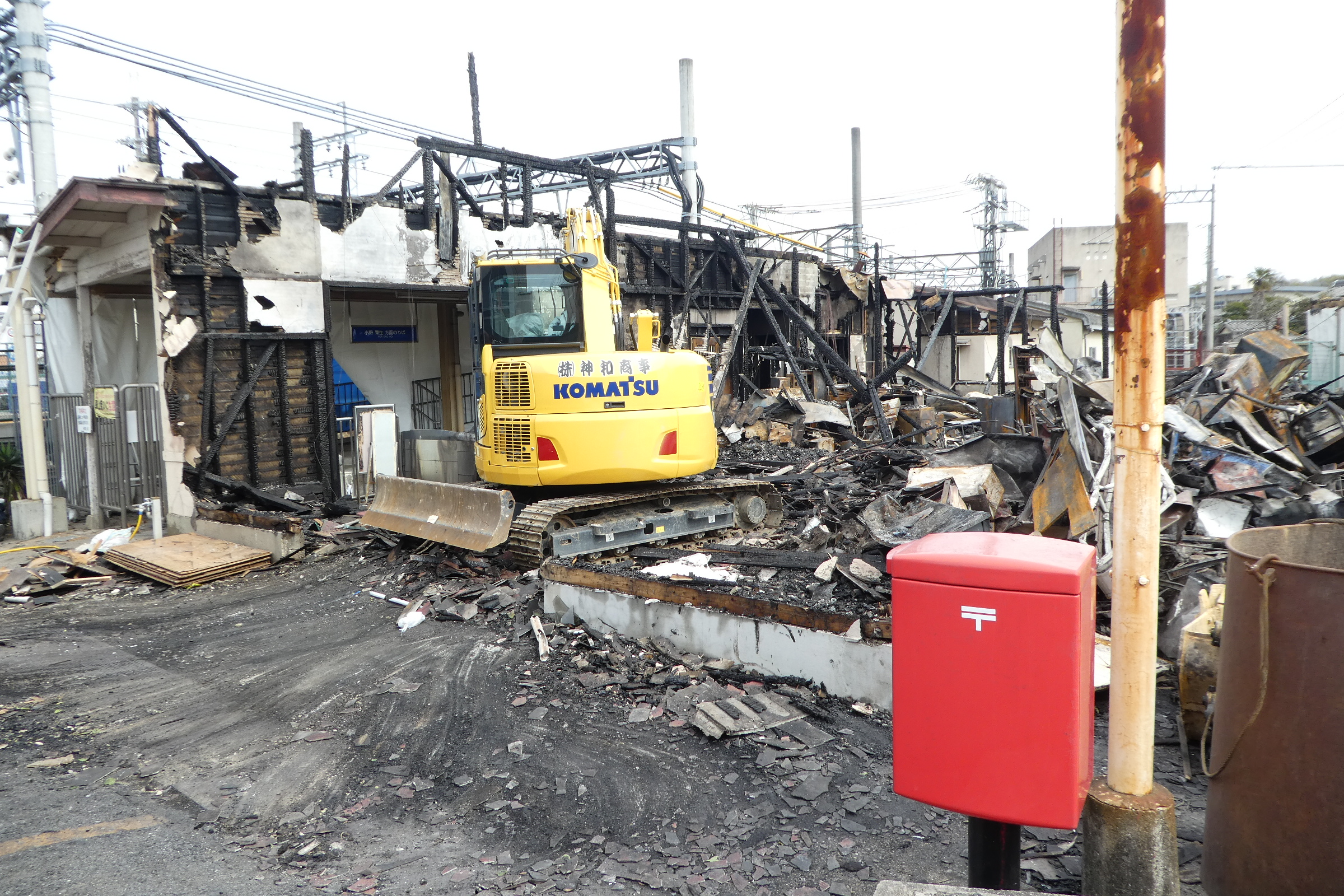 神戸電鉄三木駅。下りホーム側駅舎跡